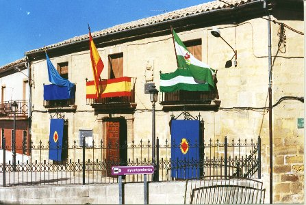 El Ayuntamiento de Rus es un inmueble de sillería del siglo XX. Tiene aire clasicista, presenta una puerta flanqueada por pilastras, huevos adintelados y recercados y, en la parte alta, el escudo de la villa. En la misma plaza y frente a él podemos encontrar soportales de pilares, con edificios de arcos escarzanos y antepechos de hierro colado. La foto fue tomada un Domingo de Mozos (24-09-2000) por Cristóbal Pulpillo López.